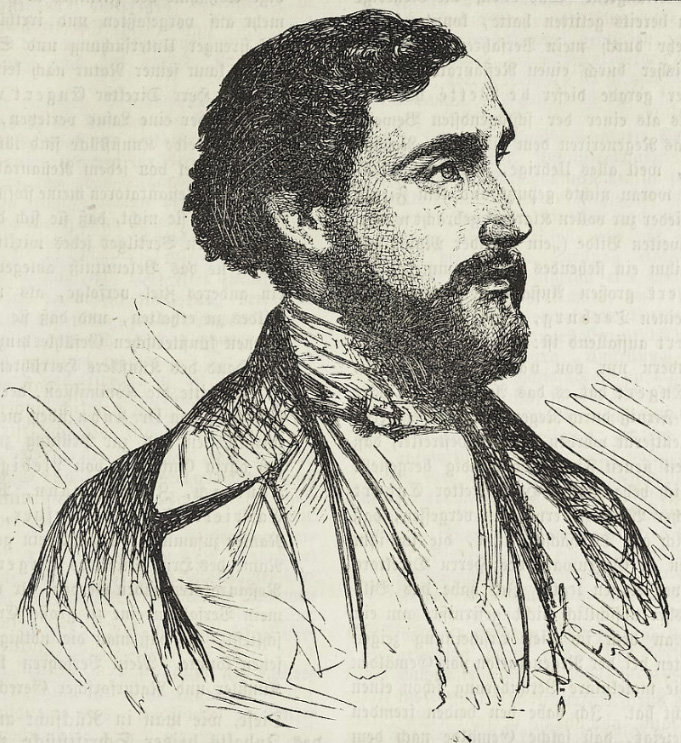 Alfred Rethel Selbstporträt, 1840er Jahre, Abbildung der Zeichnung in Die Dioskuren, Allgemeine dt. Kunstzeitung, Beilage No. 25, 1864